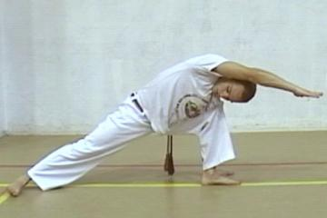 Rasteira de chão